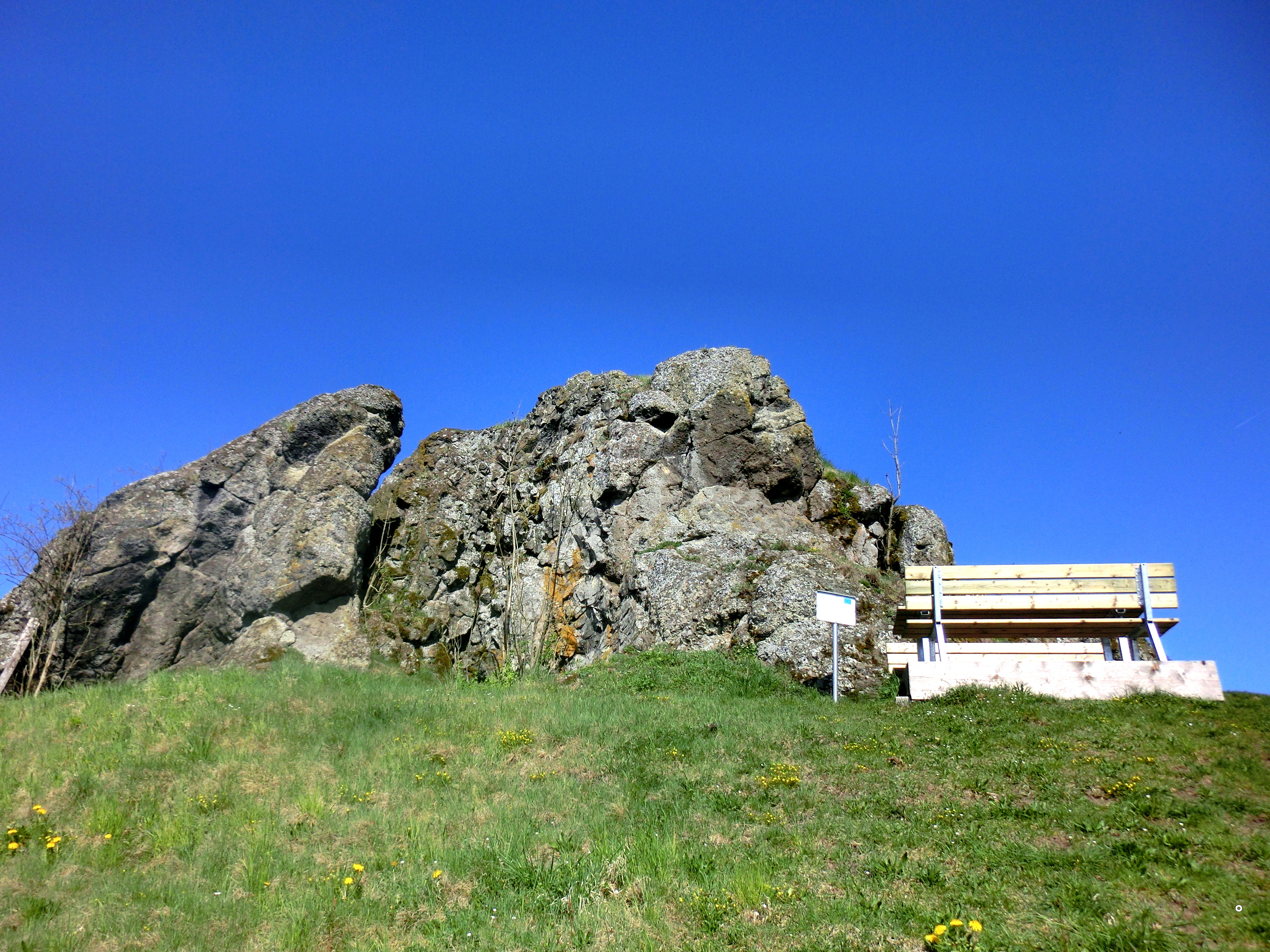 Kleiner Kulm bei Neustadt